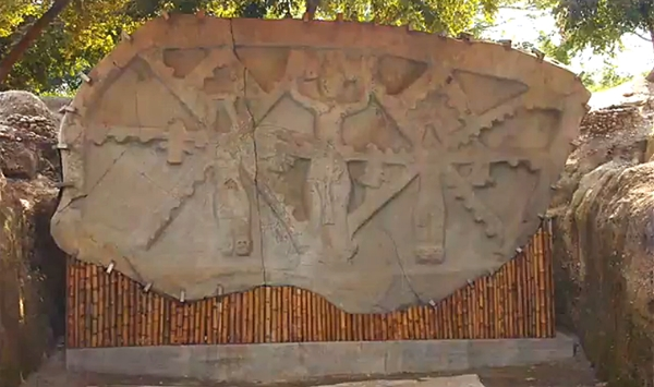 Monumento 32, Tamuin, S.L.P., Mexico